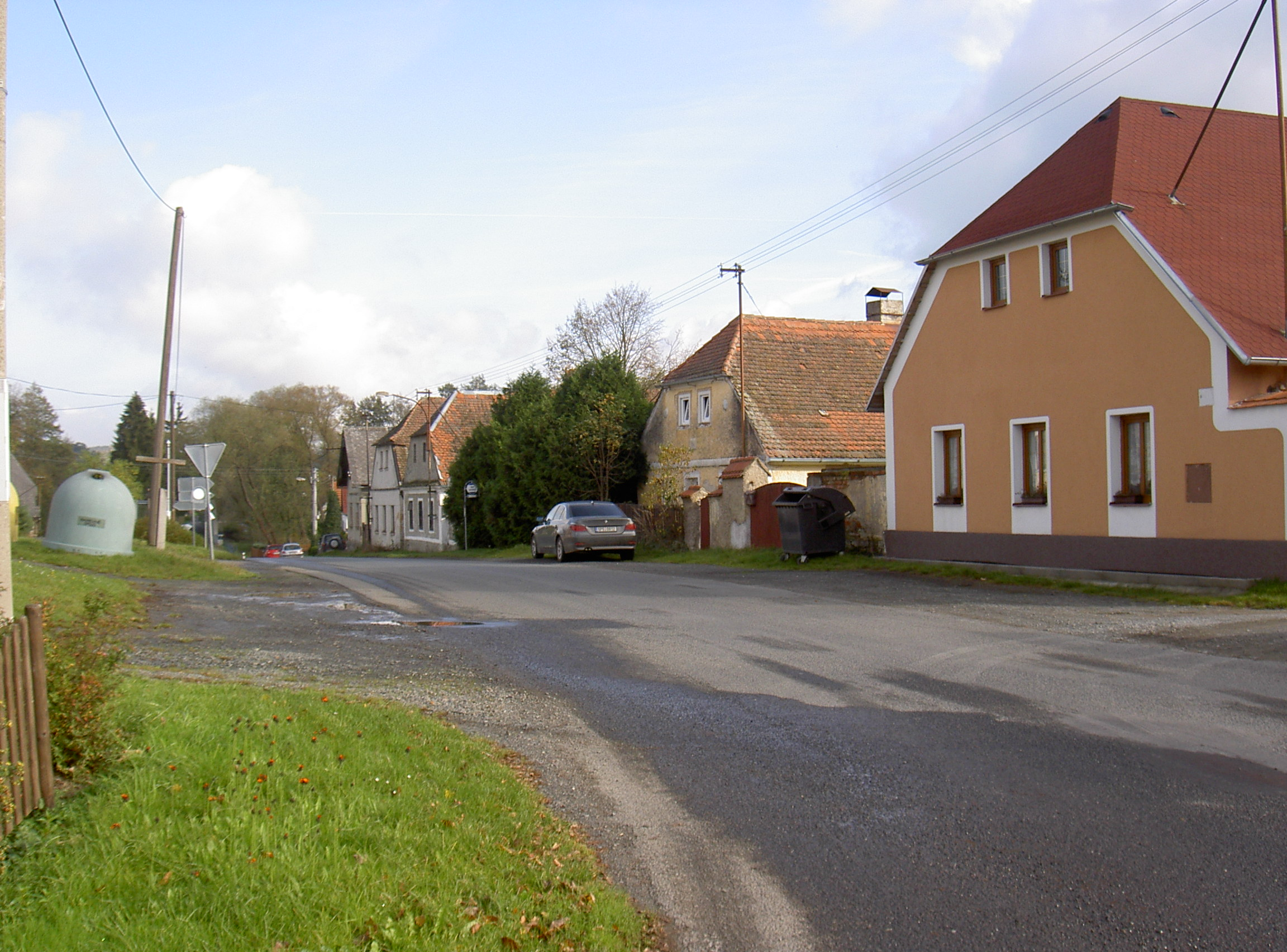 Häuser in Svržno